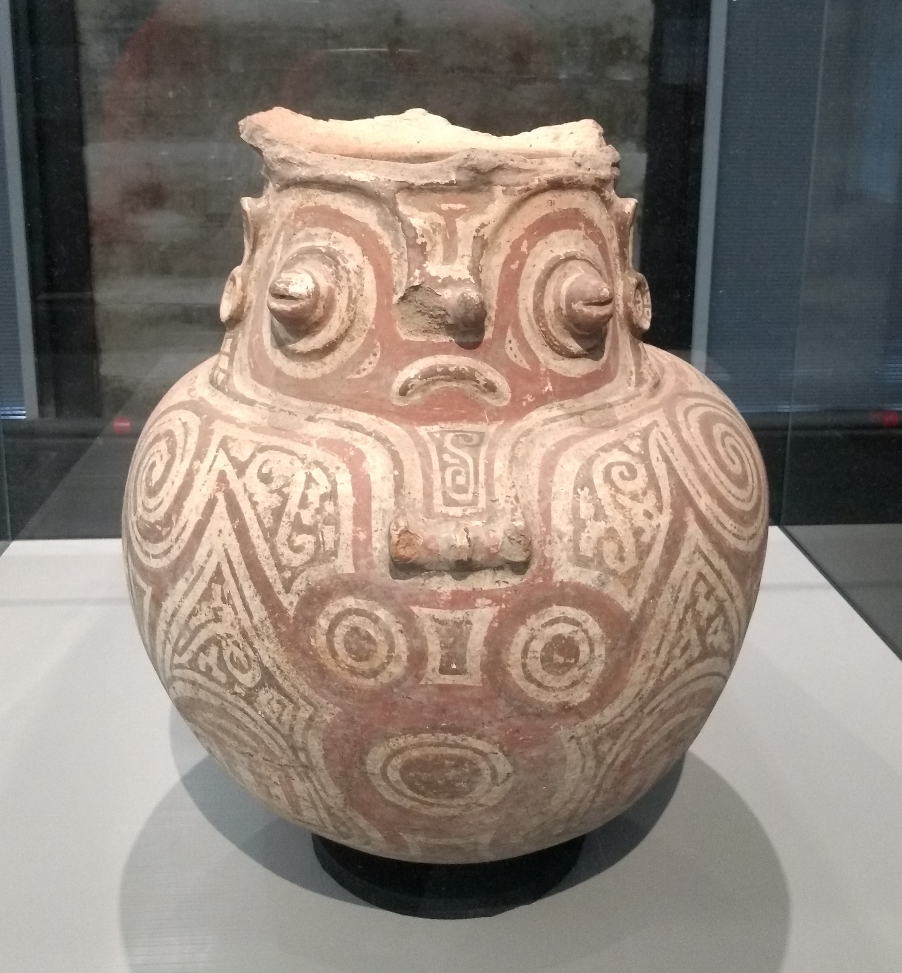 A Marajoara Culture funerary urn.